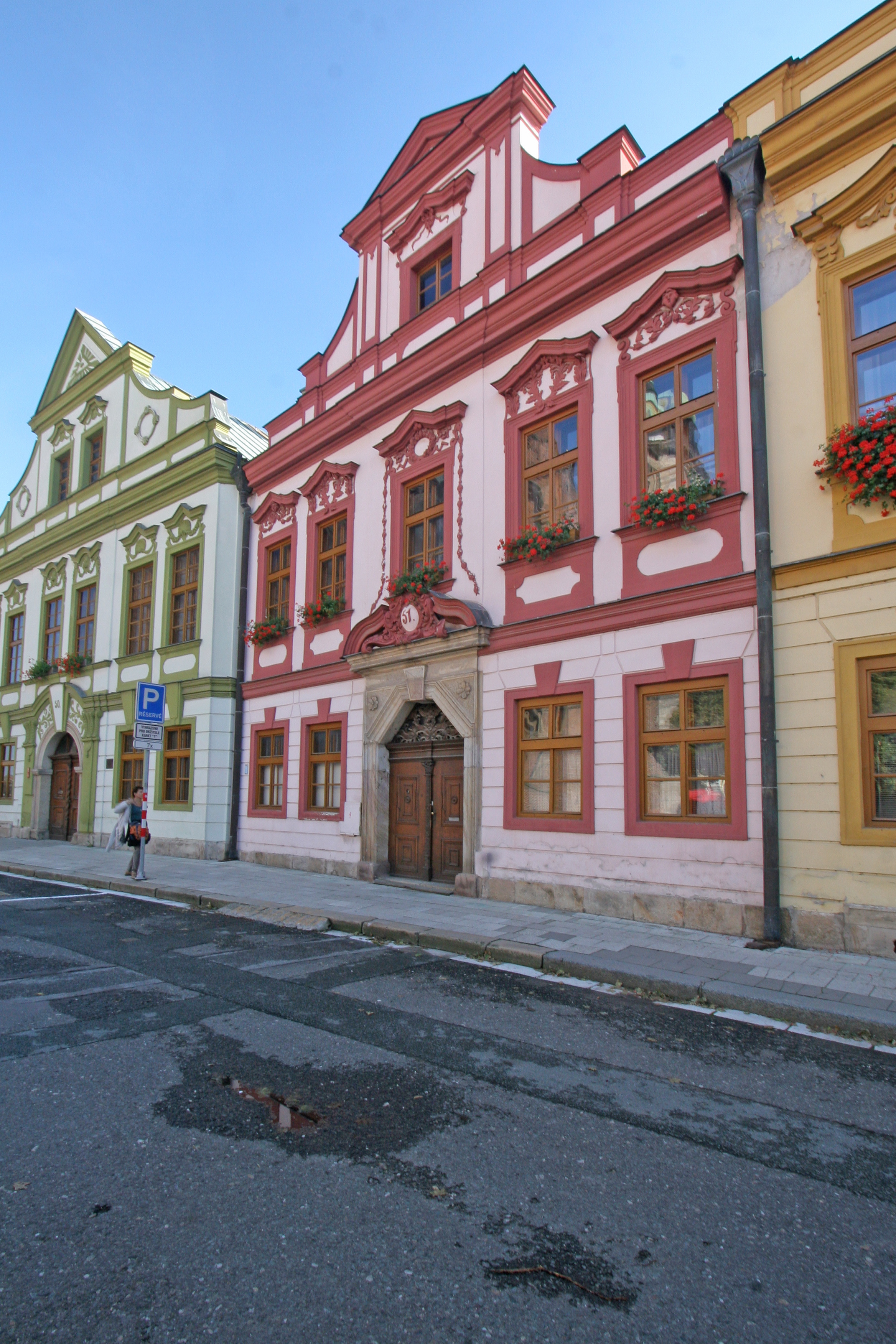 Kanovnický dům (Hradec Králové), nám. Jana Pavla II. 51/3, Hradec Králové